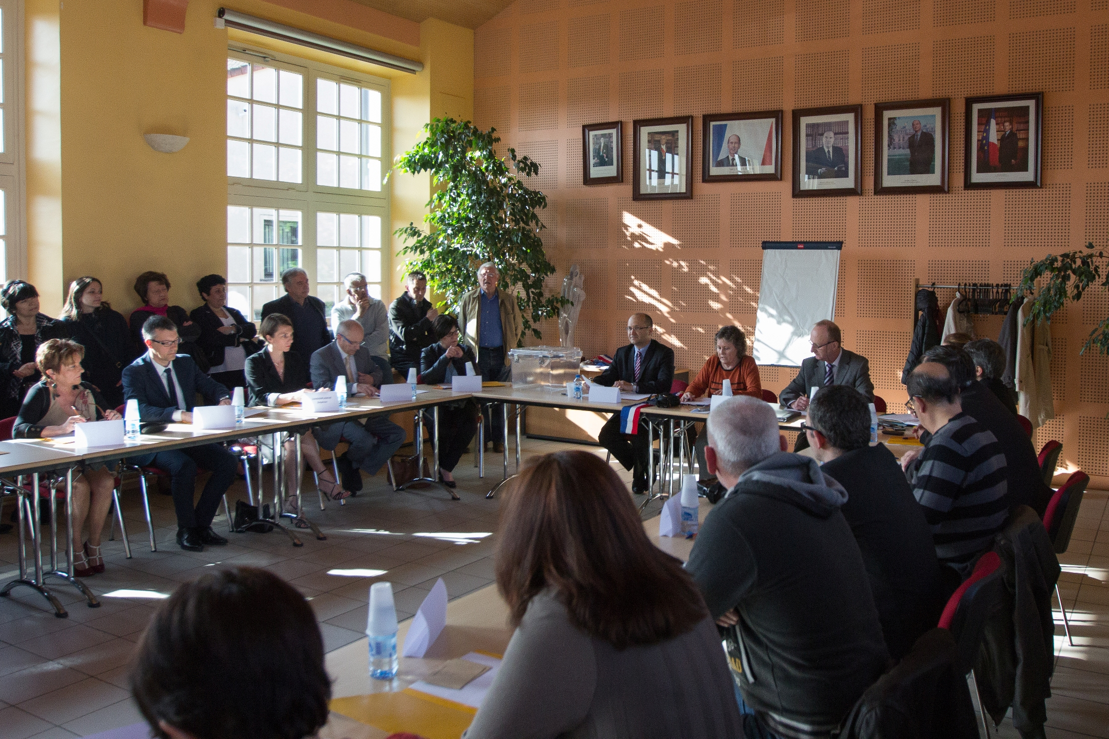 Conseil municipal de la commune de Villabé, 5 avril 2014, élection du maire (Villabé, Essonne, France)